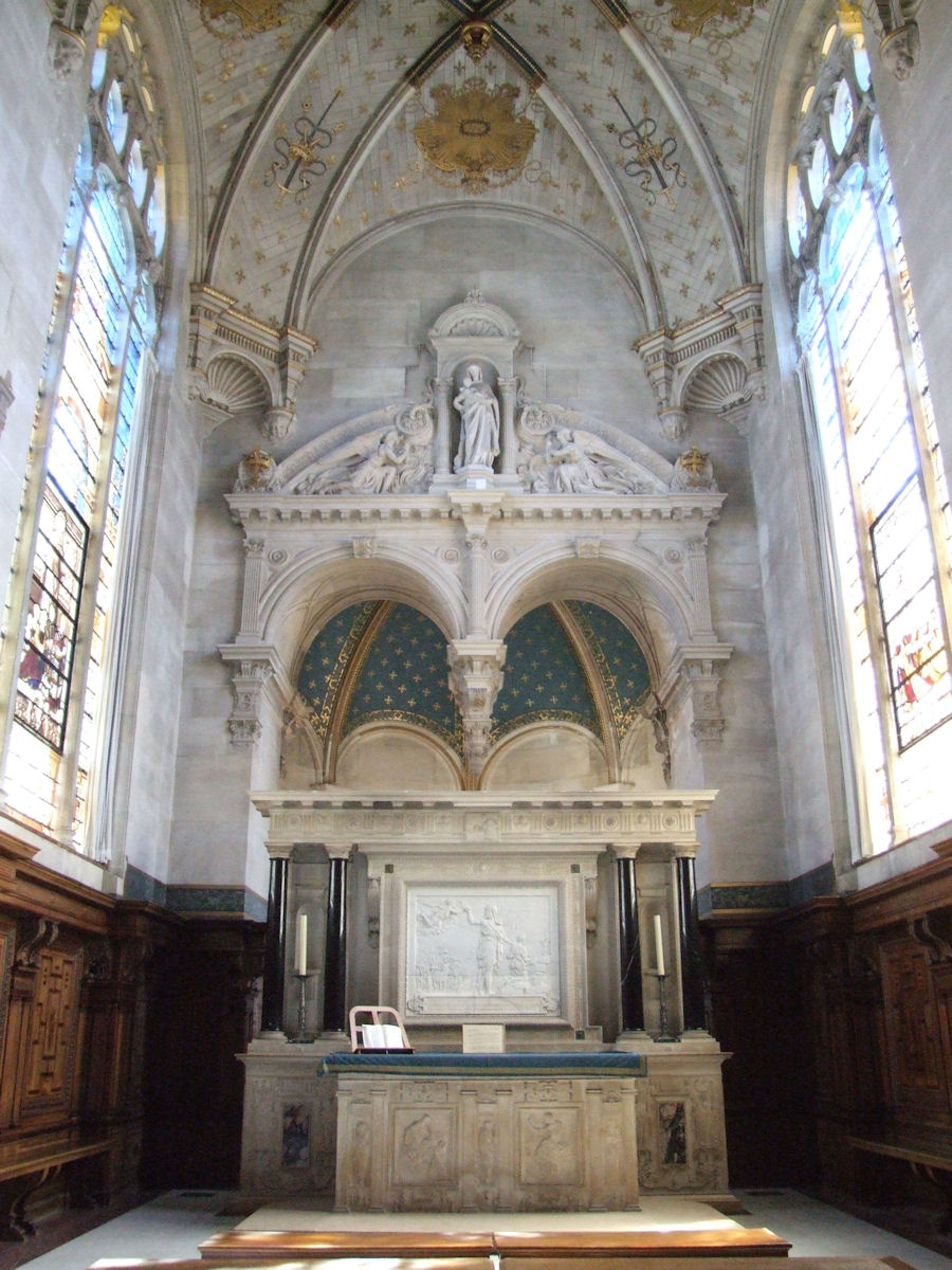 Château de Chantilly, France